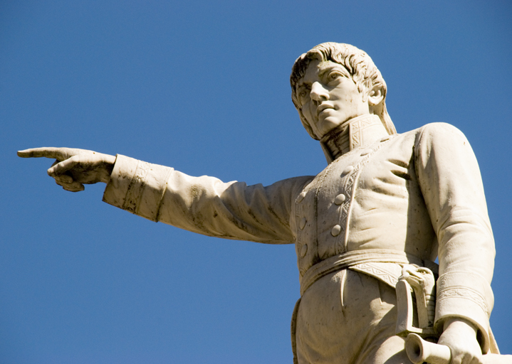 Mutriku (Guipúzcoa): Monumento a Cosme Damián Churruca. Marino vasco, muerto en la batalla de Trafalgar